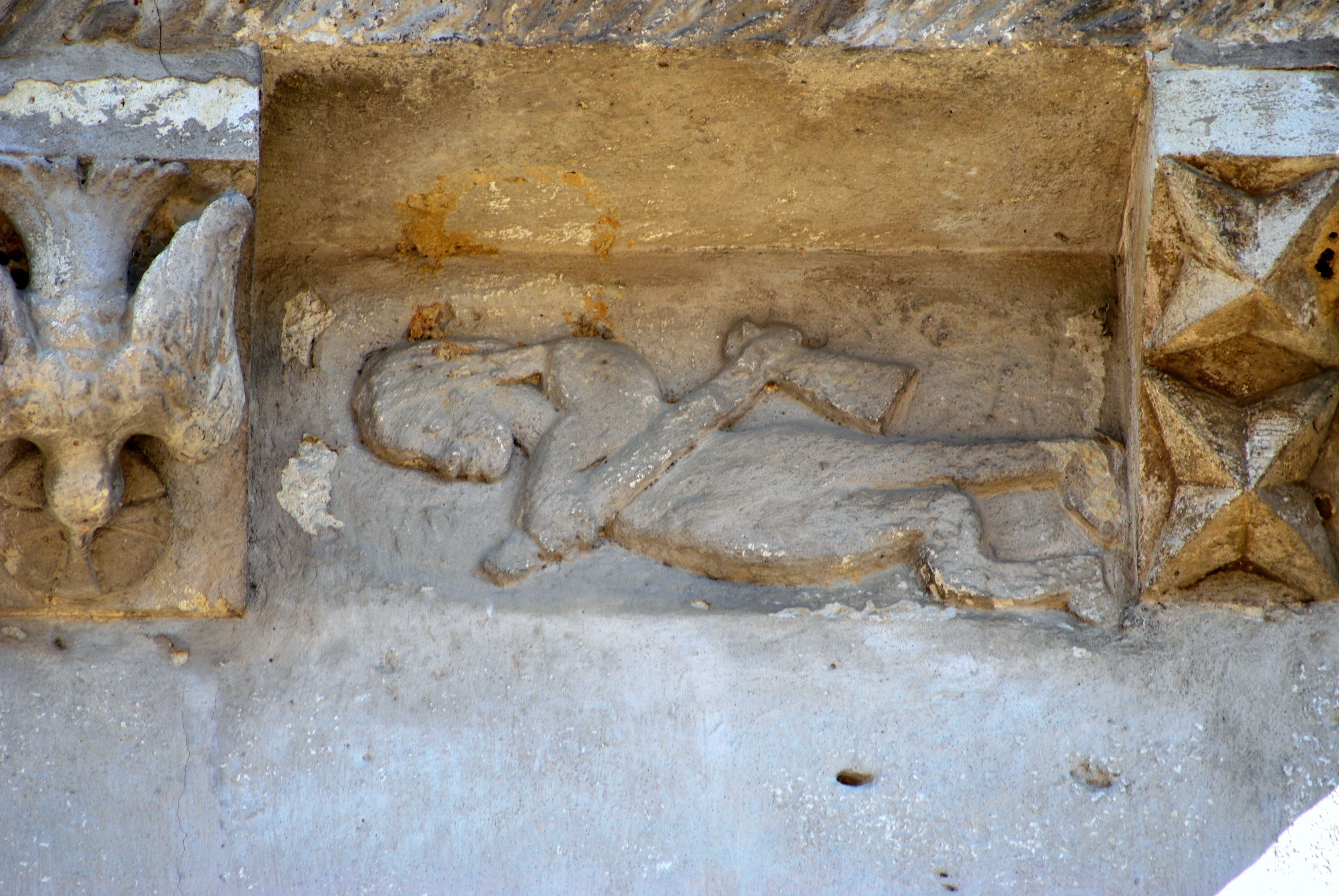 Targon église St Romain